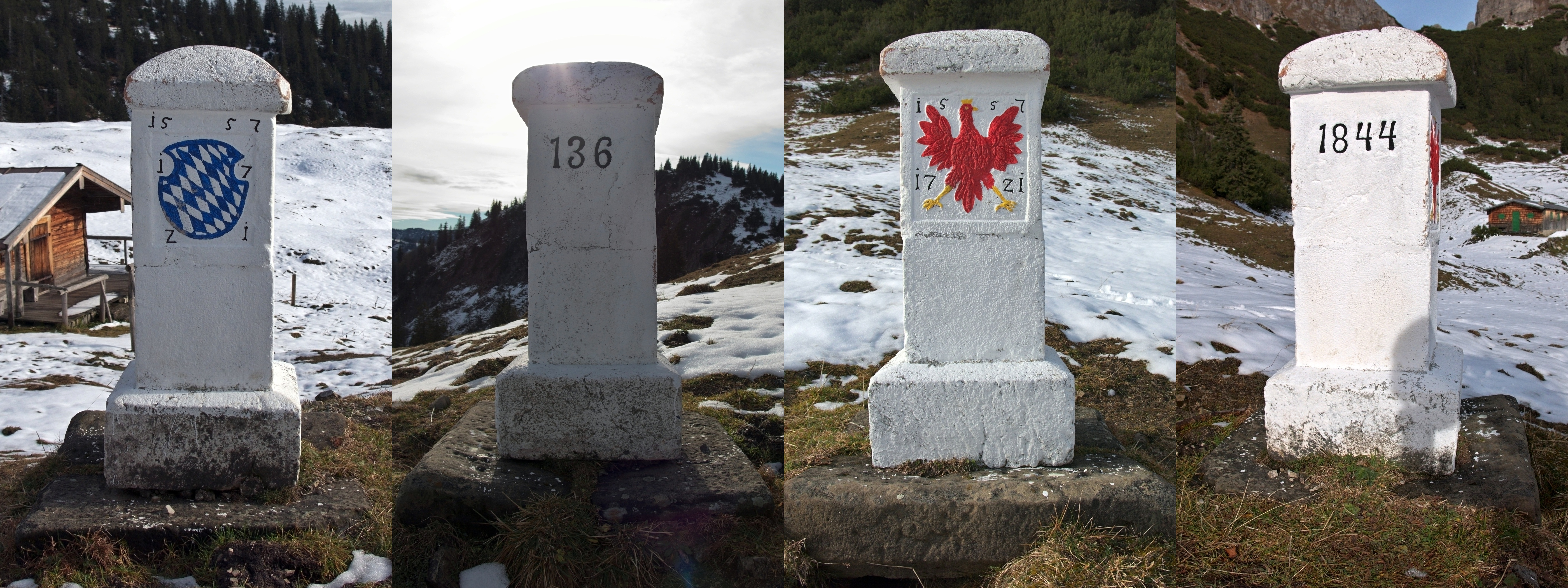 Grenzstein Bayern Tirol 1557/1771/1844 Nr.136